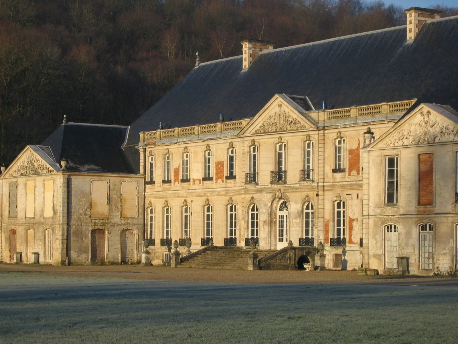 Abbaye de Gruchet-le-Valasse, en Seine-Maritime, Haute-Normandie/ Photographie personnelle, prise en décembre 2004, par l'utilisateur Urban/ GFDL Urban